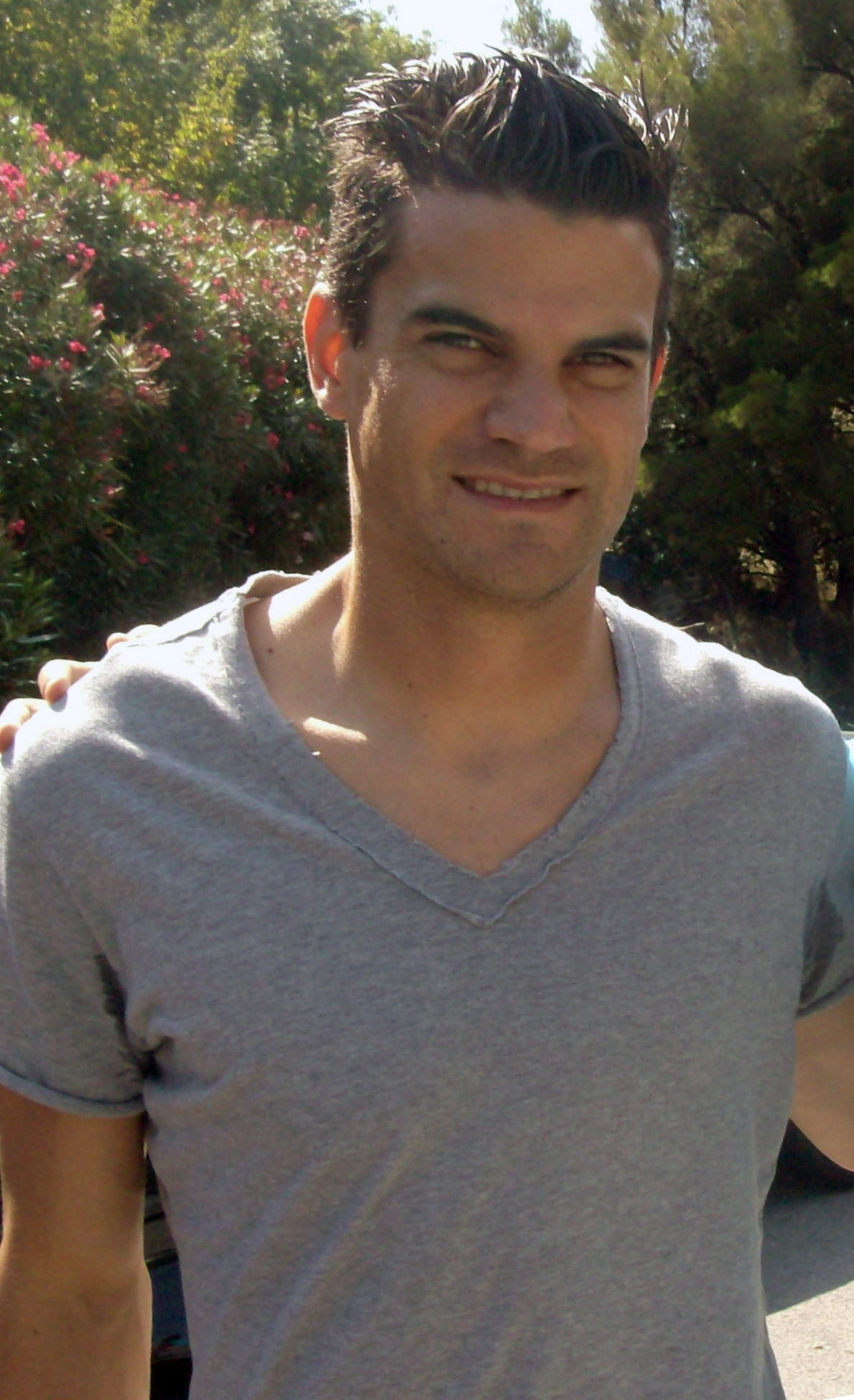 Angelo Da Costa a Bogliasco